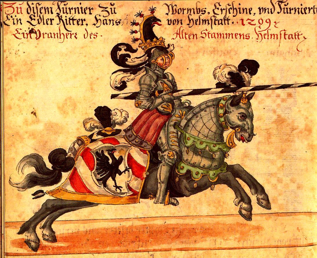 Darstellung eines Ritters aus dem Codex Rossianus 711